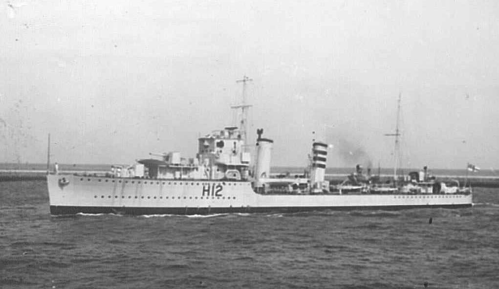 Der Zerstörer HMS Achates von 1930